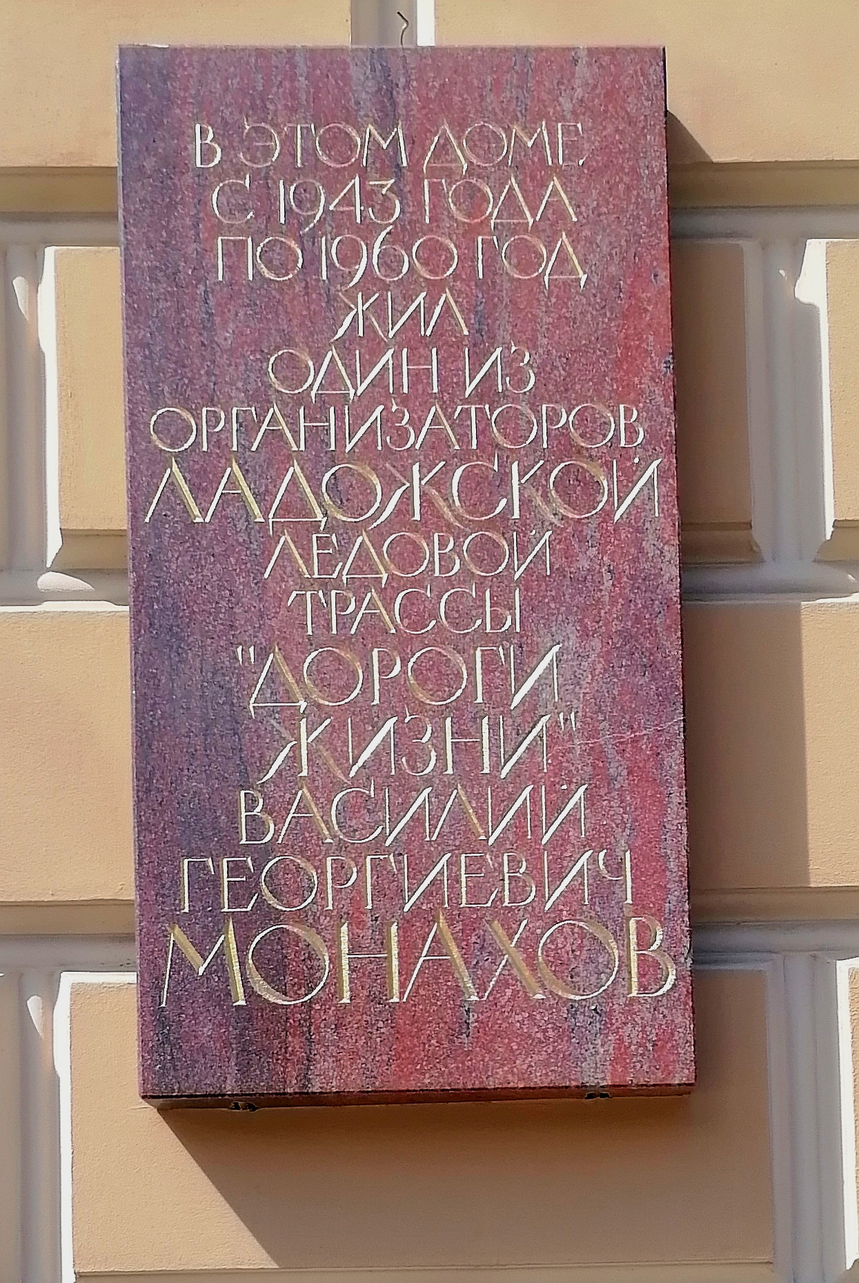 Мемориальная доска на доме № 4 по Манежной площади, посвящённая В. Г. Монахову — одному из организаторов Дороги Жизни.